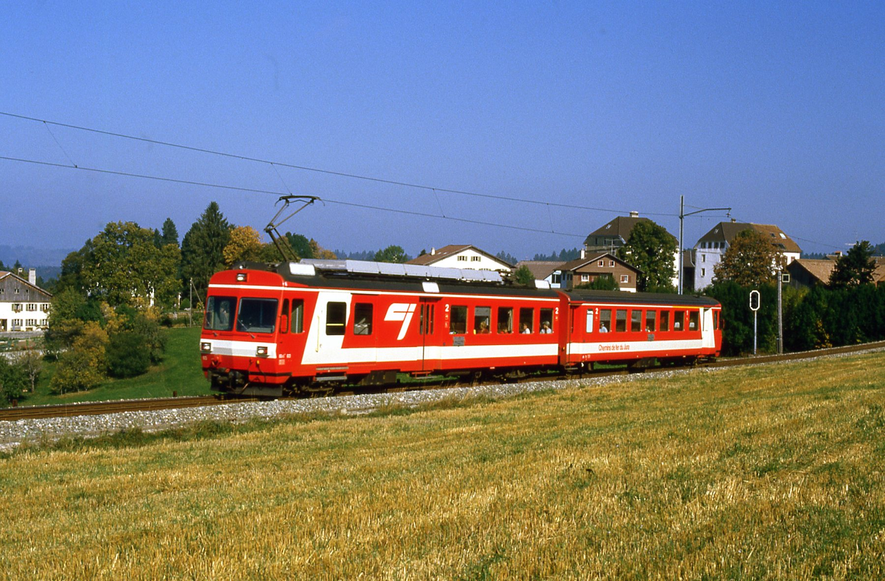 Photo: Trams aux Fils. La ligne du C.J. Chemin de Fer du Jura à été construite entre 1884 et 1913 à voie métrique, sa longueur et de 51,1 Kilomètres